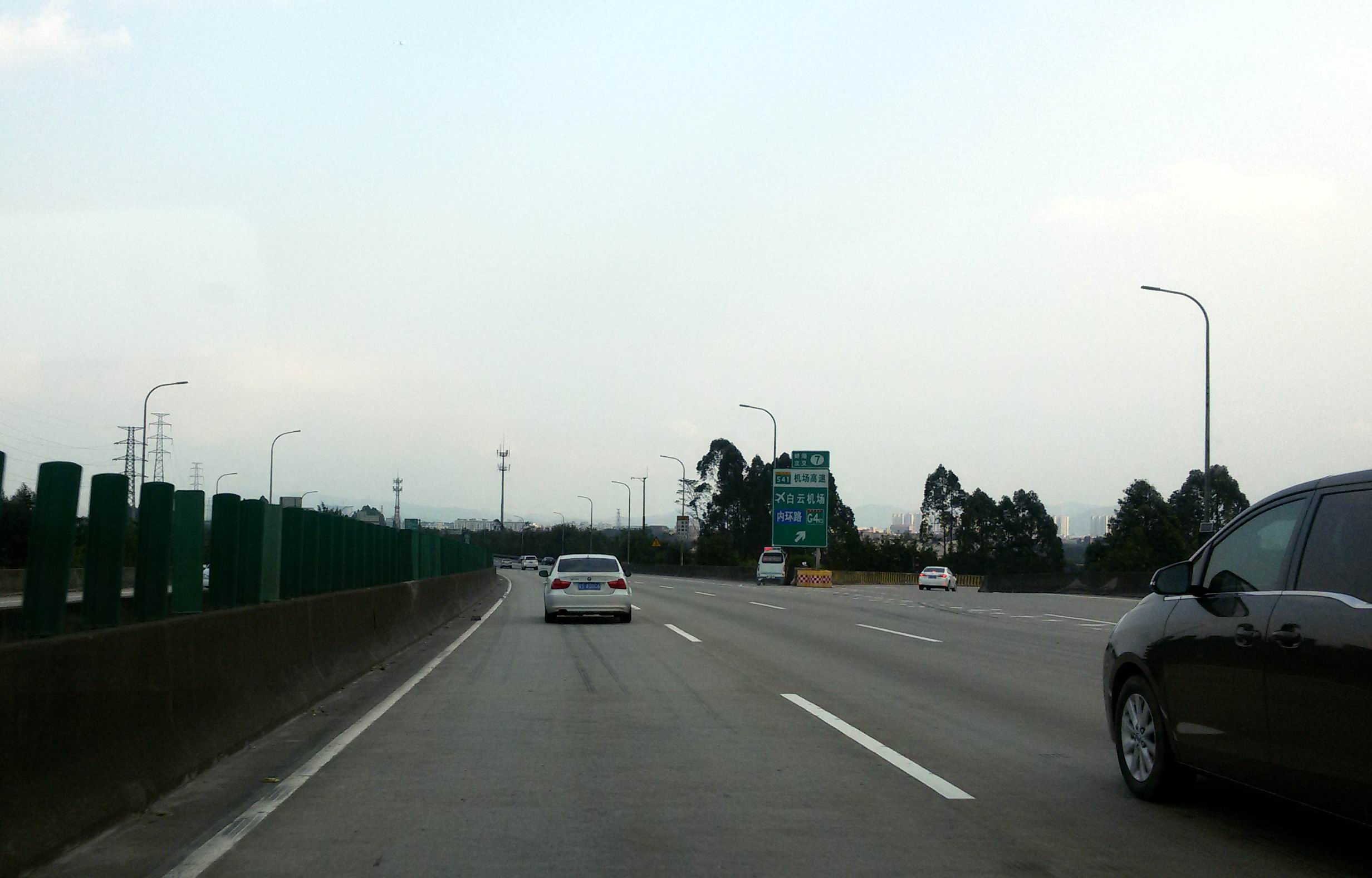 中国高速G1501（广州） 近粤高速S41 7出口 顺时针方向